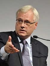 Ivo Josipović sudjelovao je danas na sučeljavanju predsjedničkih kandidata u sklopu ‘Weekend sessiona’ u Zagrebu. Sučeljavanju na temu “Tko je hrvatski Obama” prisustvovali su i Vesna Pusić, Vesna Škare Ožbolt te Andrija Hebrang. Više informacija pročitajte na